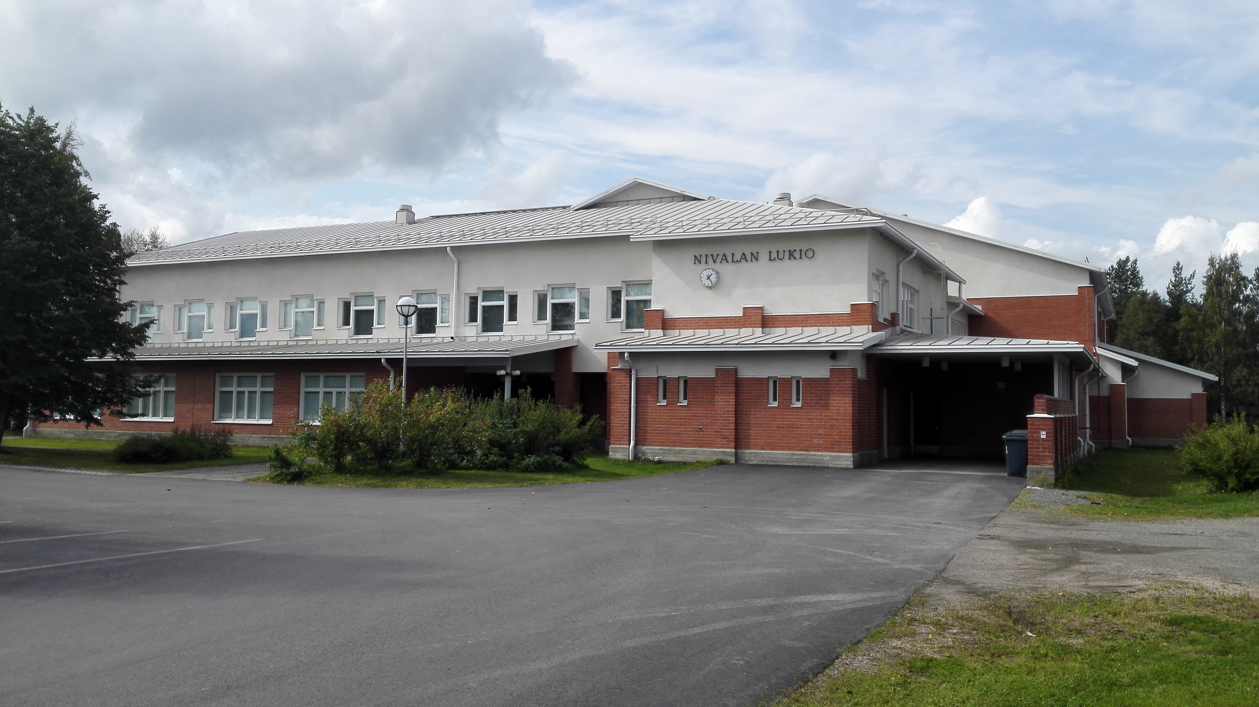 Nivalan lukio 20.8.2016